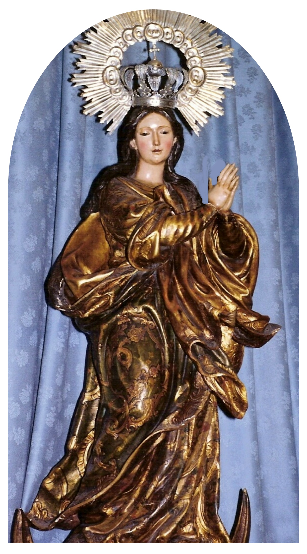 Inmaculada Concepción obra de José Montes de Oca, Iglesia de la Conversión de San Pablo, Cádiz